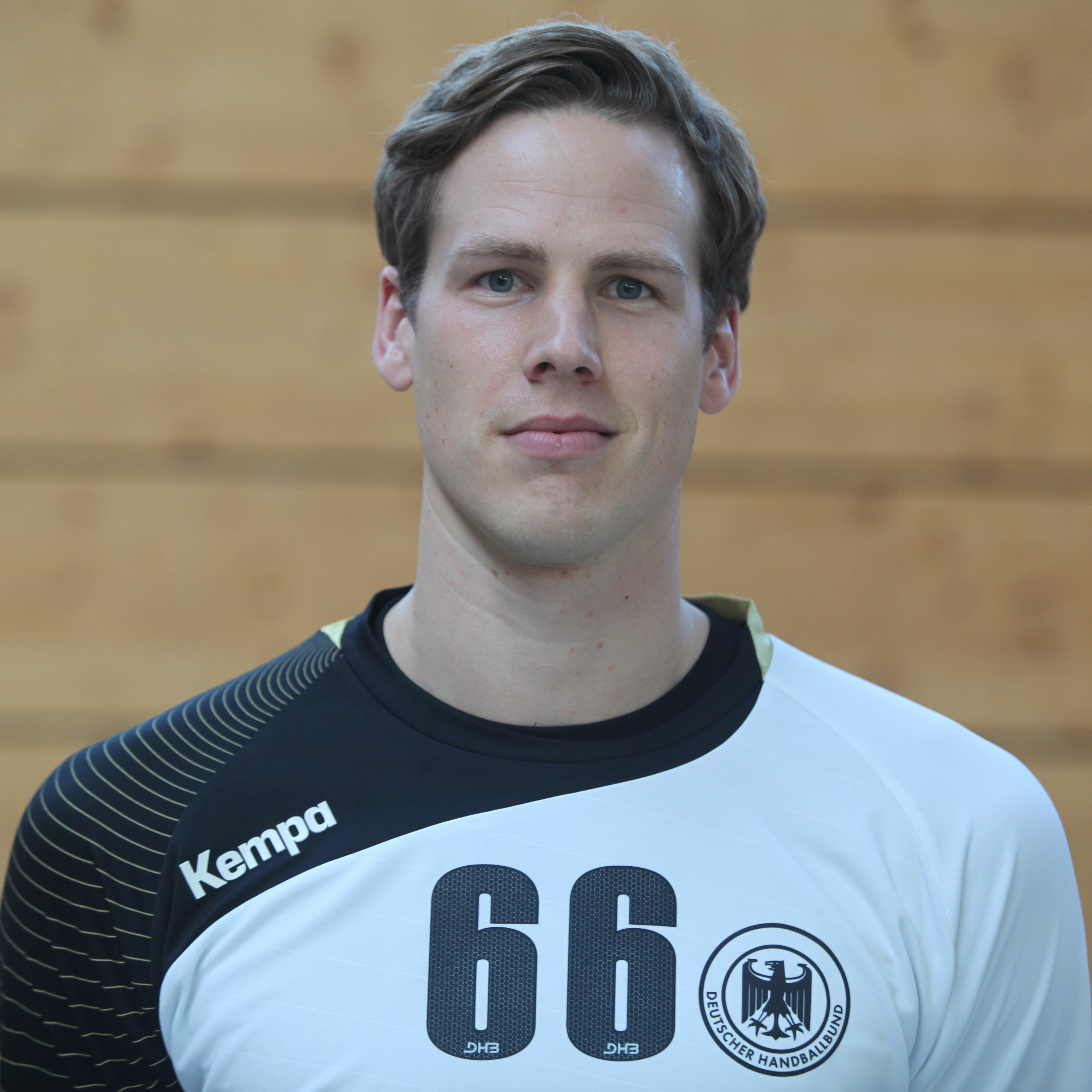 Sven-Sören Christophersen, im Trikot der Deutschen Handball-Nationalmannschaft am 16. September 2014, in Heilbronn.